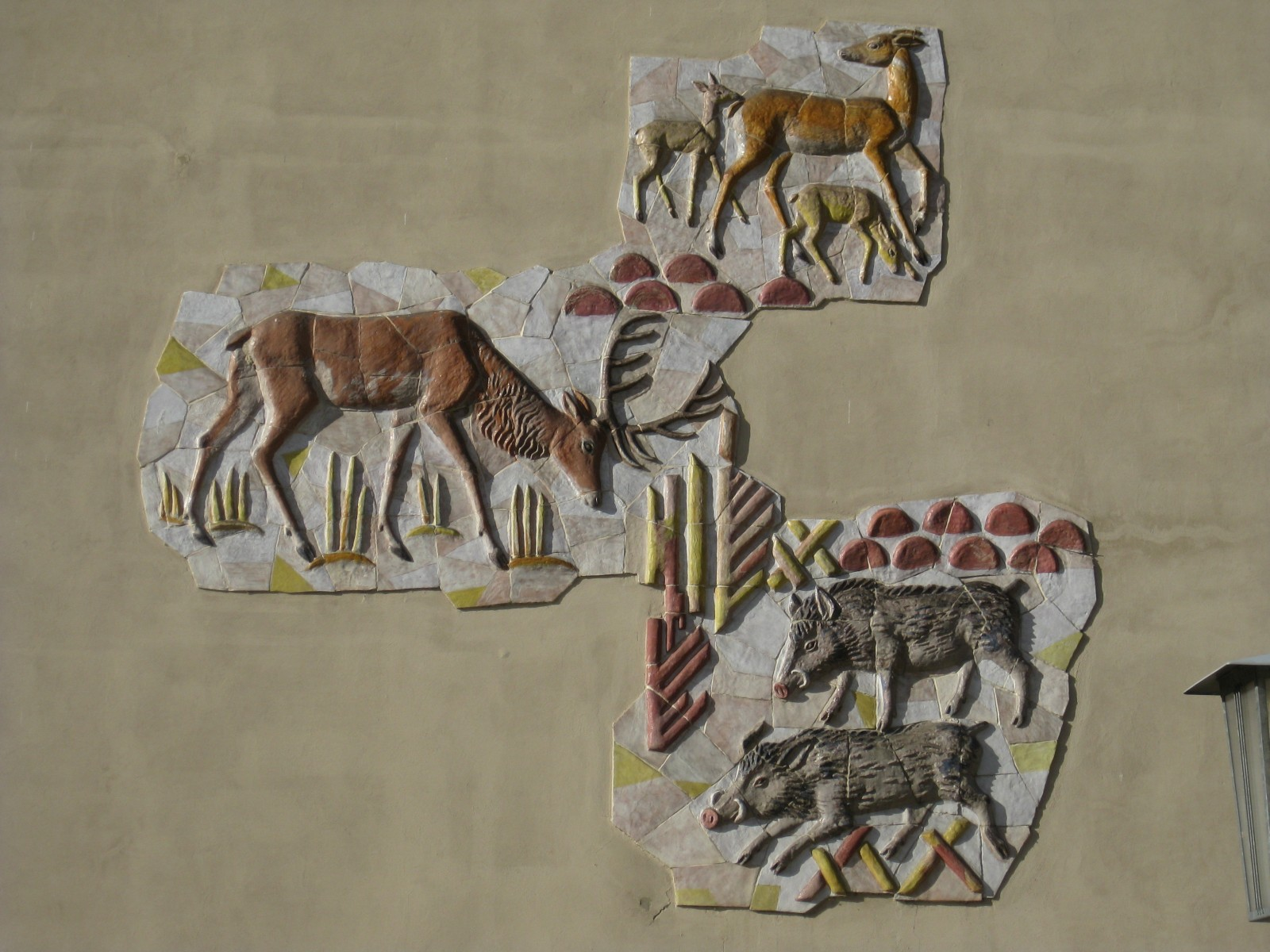 Wandrelief Jagdszenen von Hertha Bucher, Breitenfurter Straße 556, Wien Liesing. This media shows the Vienna residential building (Gemeindebau) with the ID 1632.